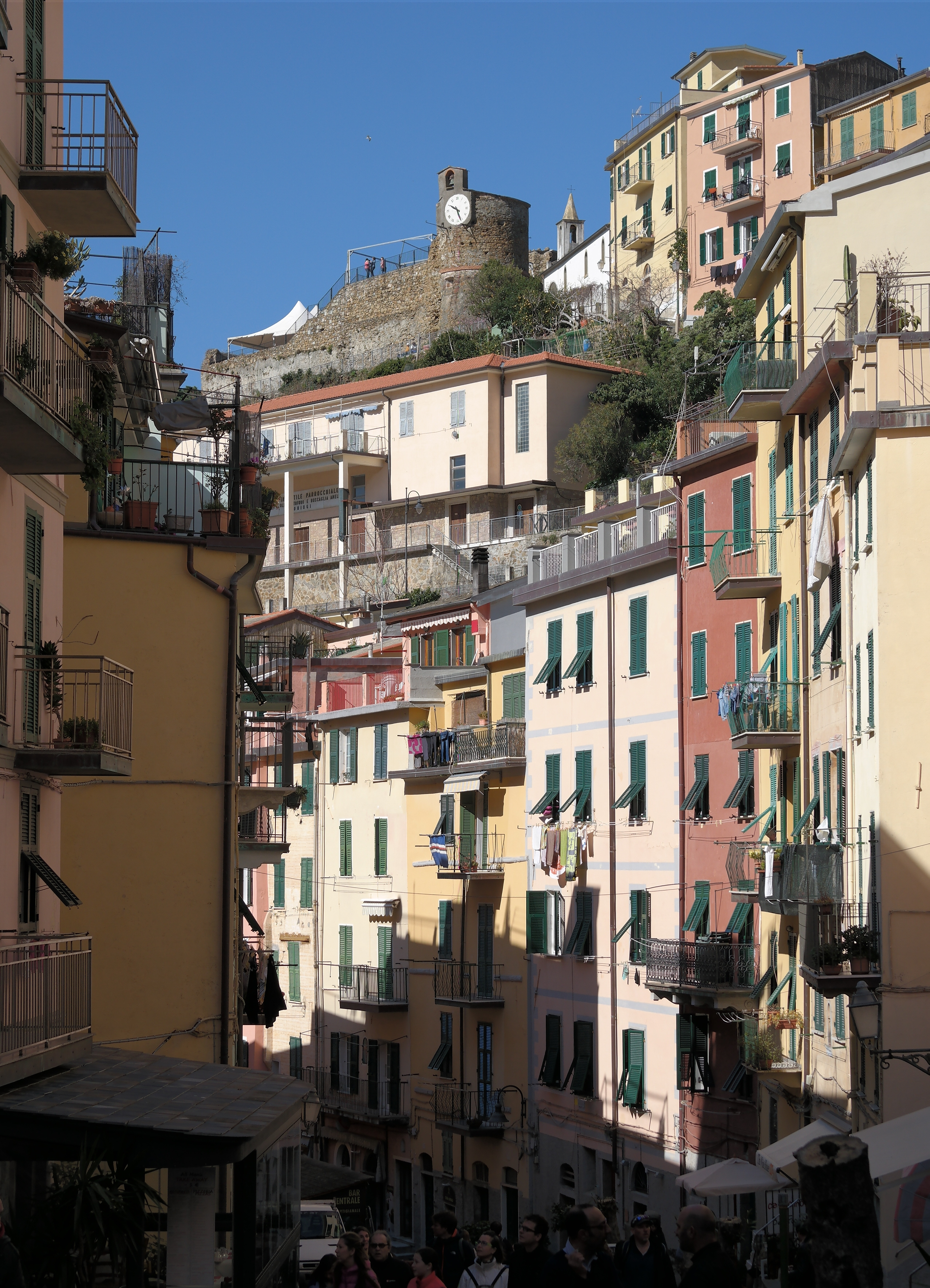 Via Colombo, strada principale di Riomaggiore. In alto si nota in castello